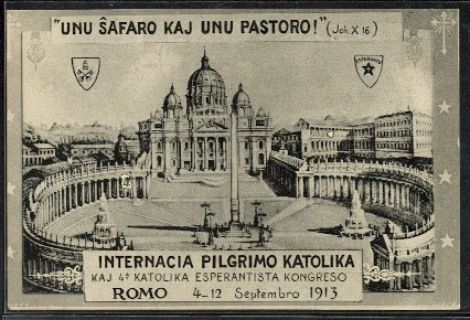 Tarjeta postal del IV Congreso Católico Esperantista celebrado del 4 al 12 de septiembre de 1913 en Roma, Italia. Por su fecha de publicación la tarjeta se considera parte del dominio público y fue tomada de